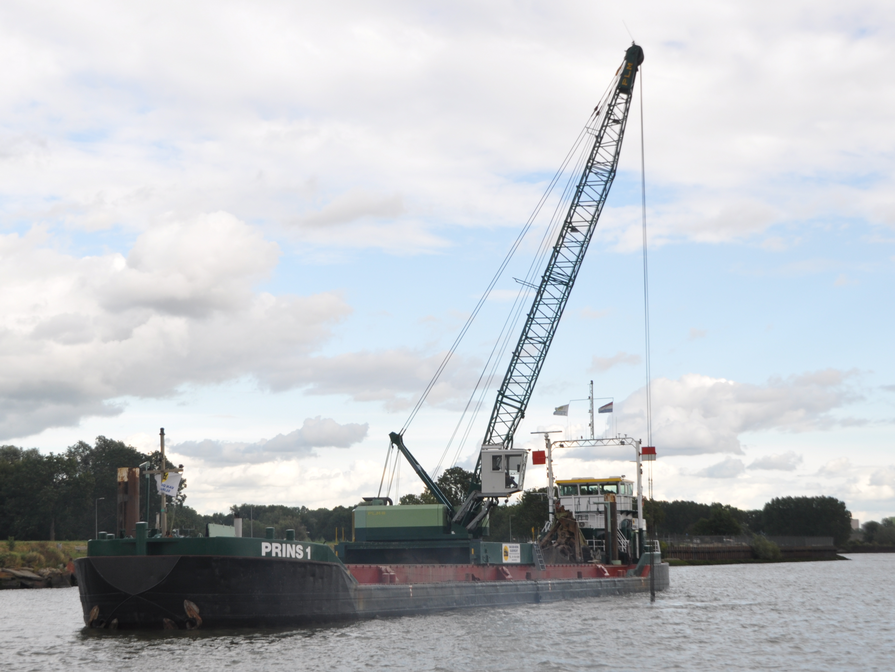 De PRINS 1 aan het werk op de Nieuwe Maas.